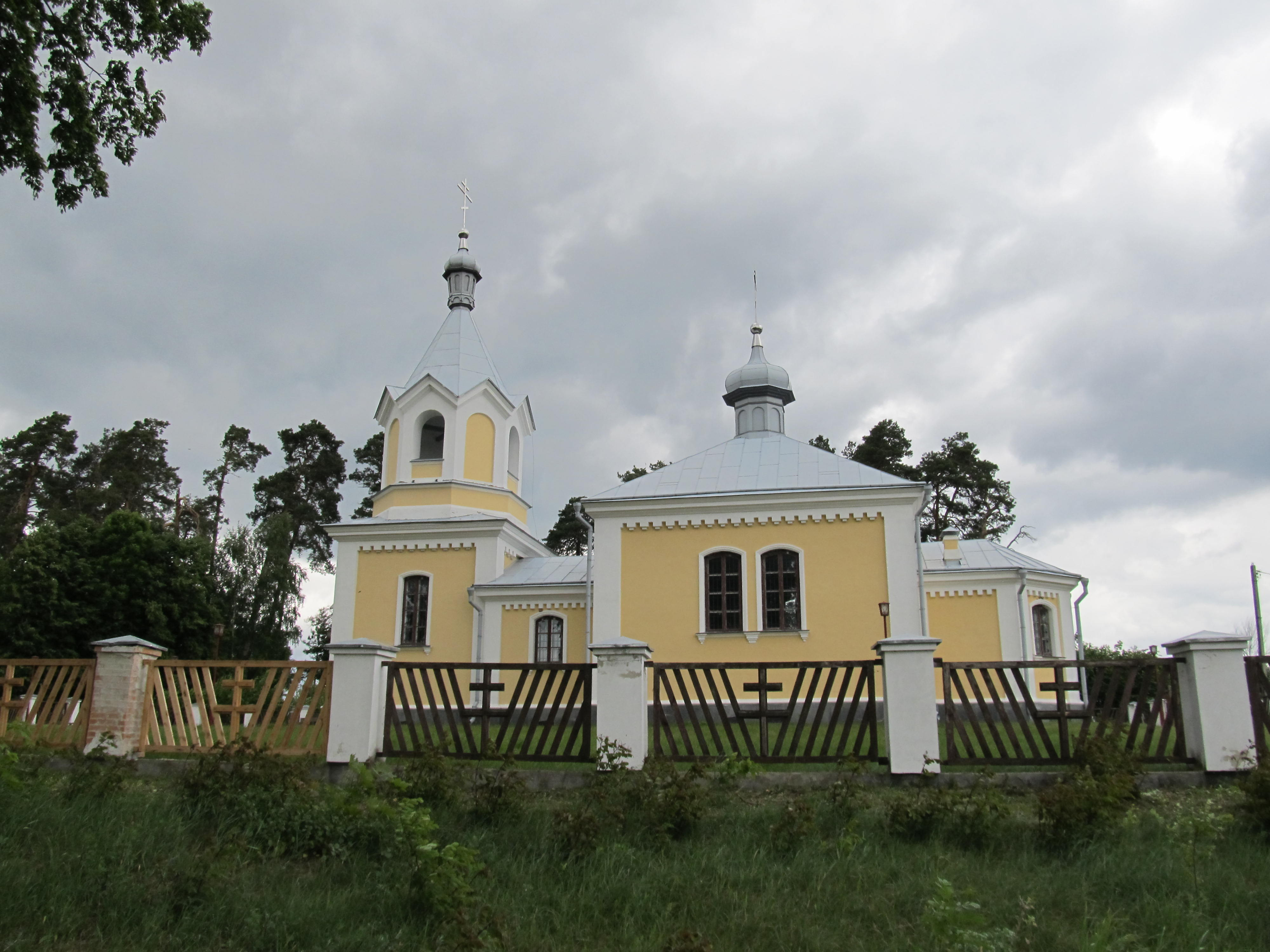 Беларуская (тарашкевіца): Царква Сьвятога Мікалая (Смаляніца). Бакавы фасад. This is a photo of Belarusian heritage monument. Reference number: 113Г000650 ( WLM)